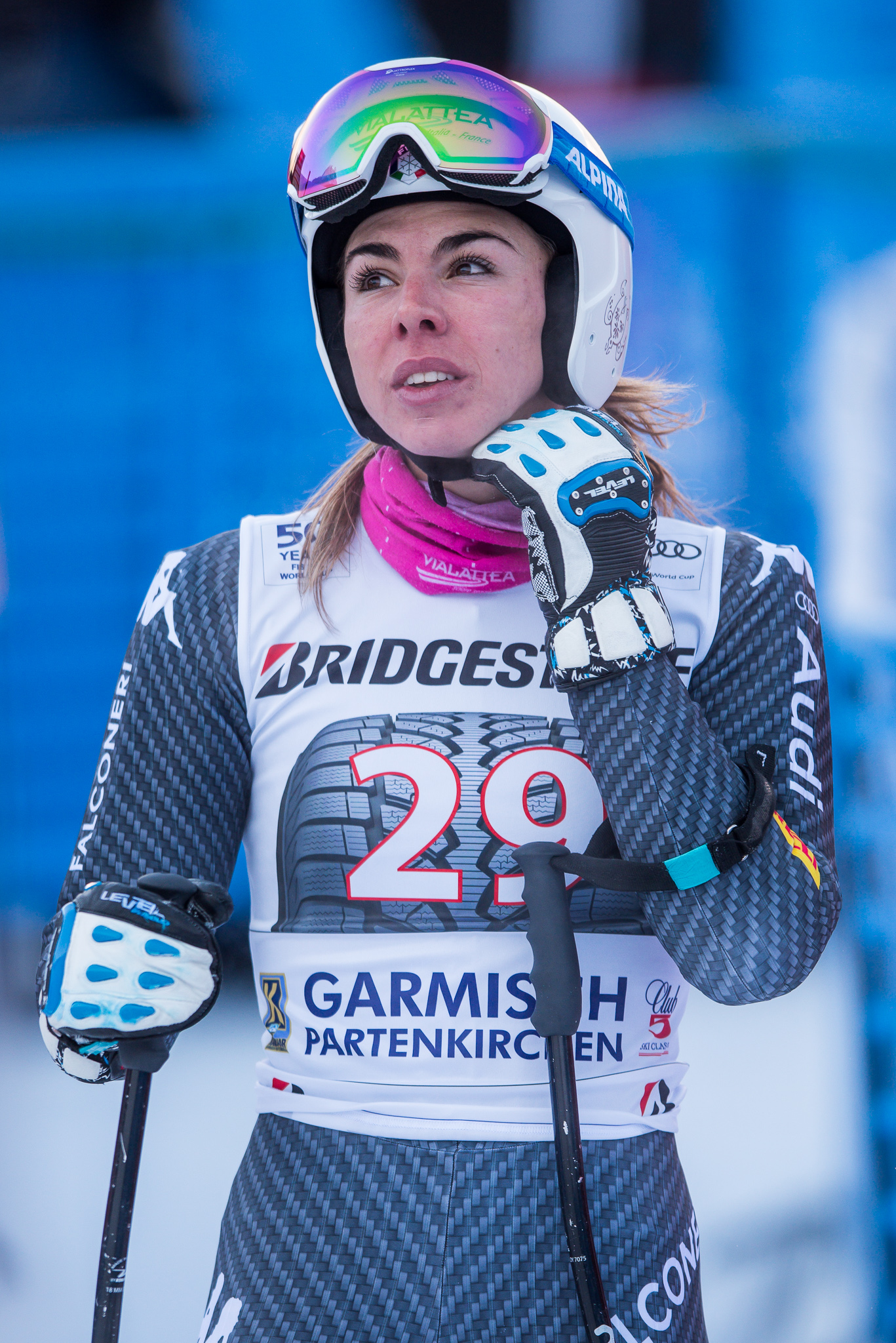 64. Kandahar Rennen,Audi FIS Ski Weltcup Garmisch-Partenkirchen,Damen Abfahrt,Francesca Marsaglia,Kandahar,Ladies Downhill